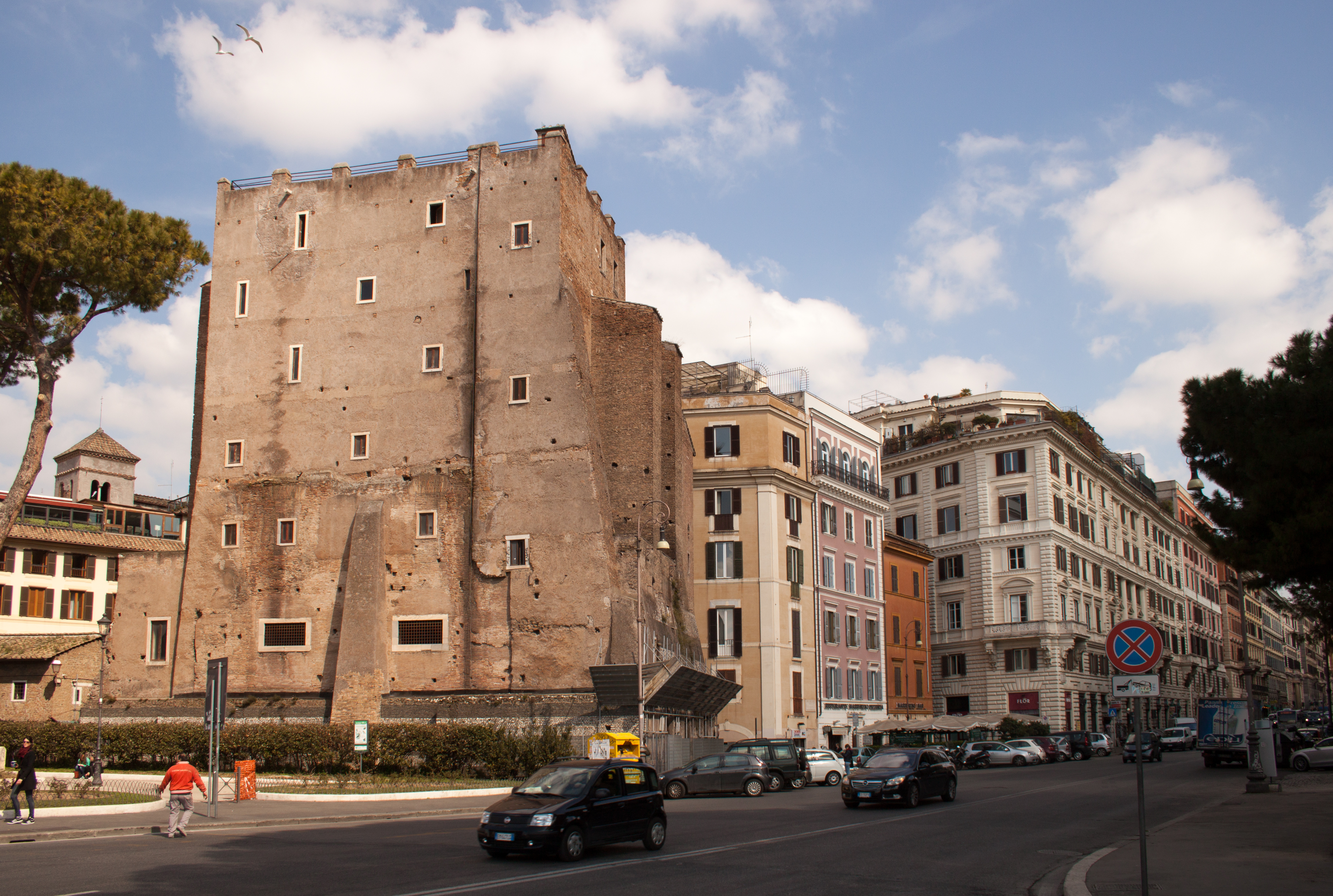 Imperial Forums in Rome